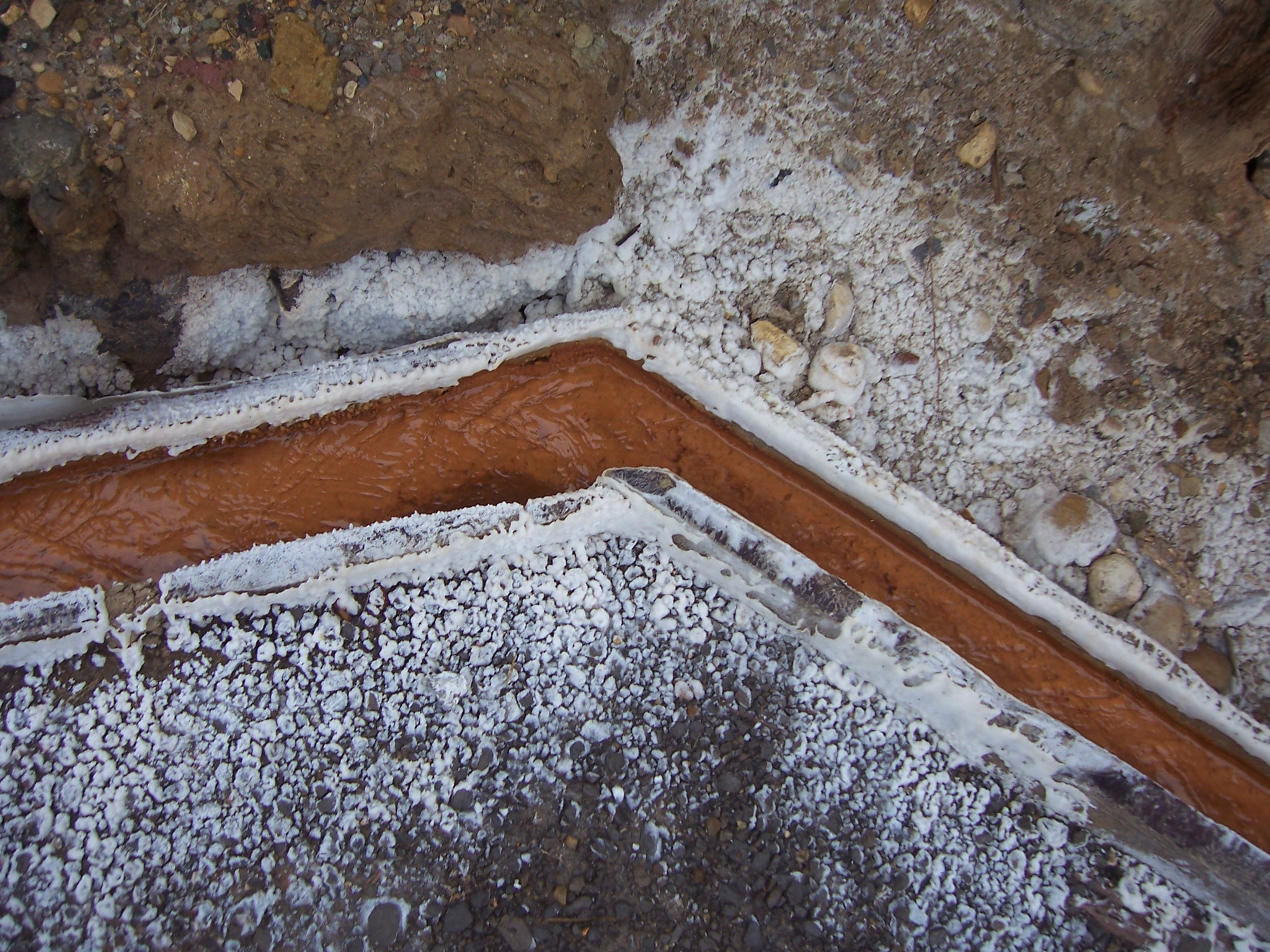 Canales de Muera en Salinas de Añana